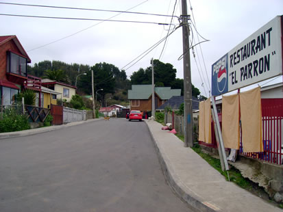 Restaurant el parron, caleta chica